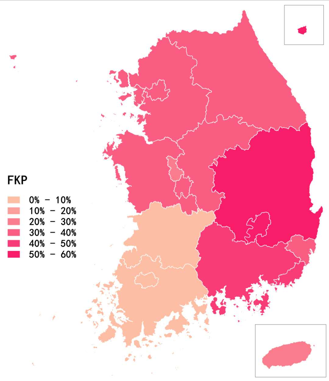 中文（中国大陆）: 第21届韩国国会选举的政党政治地图